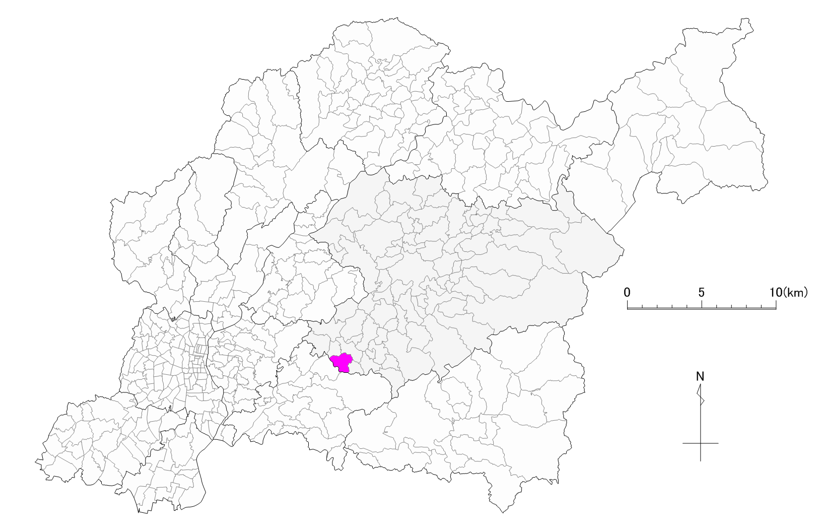 豊田市上脇町位置図